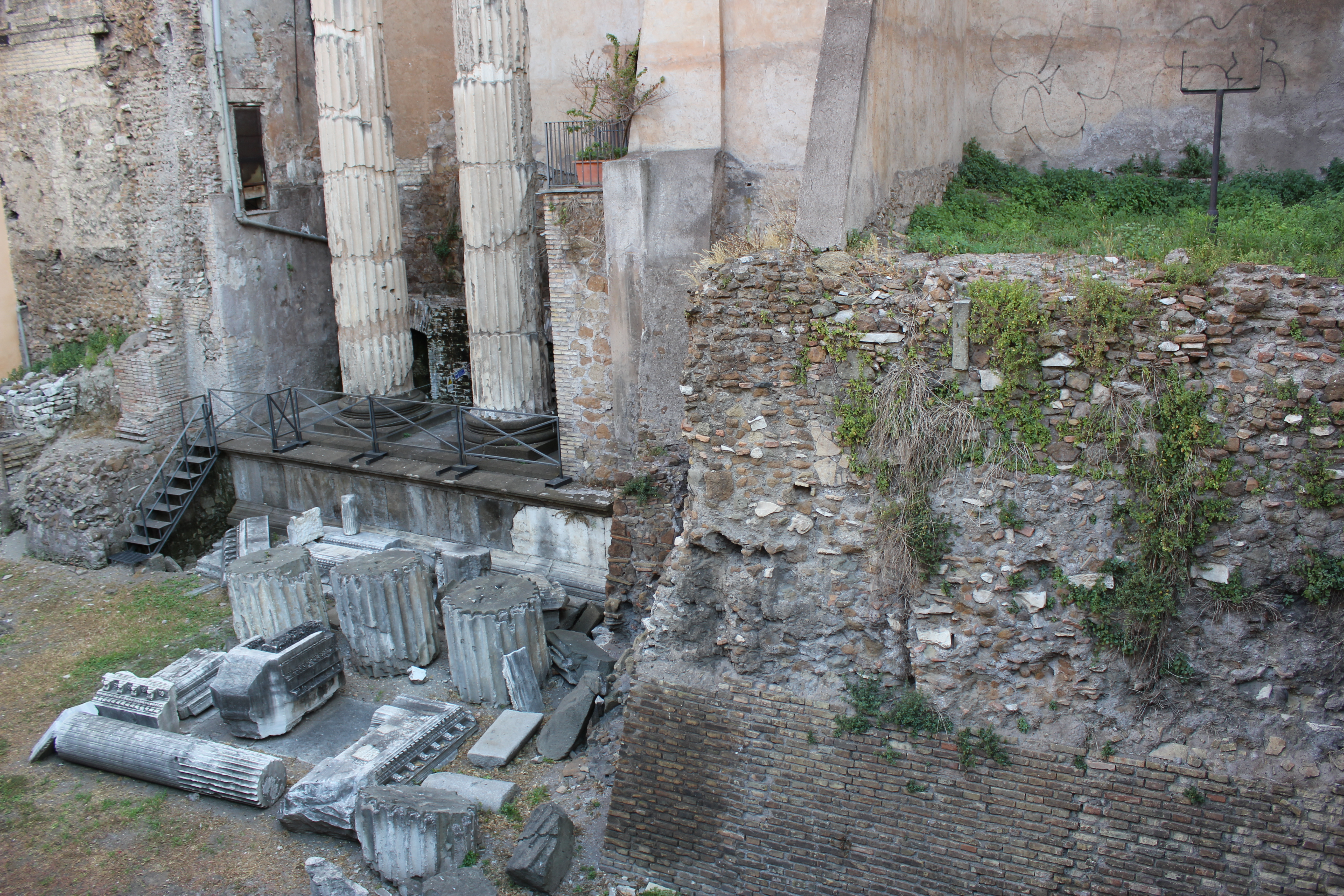 Минуциевы ворота в Риме (улица Боттеге-Оскуре)